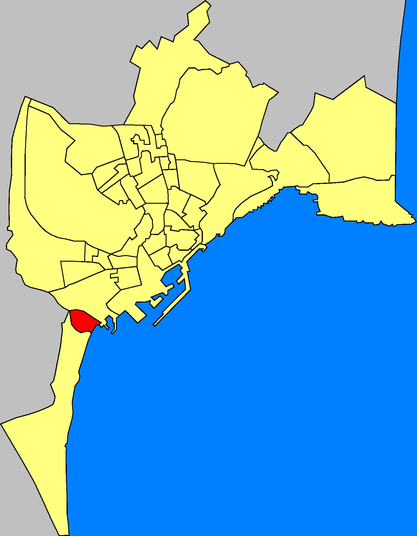 Mapa de localizacion del barrio de San Gabriel en Alicante